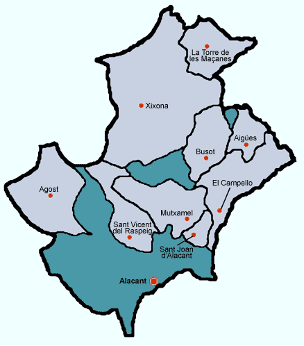 Localització d'Alacant